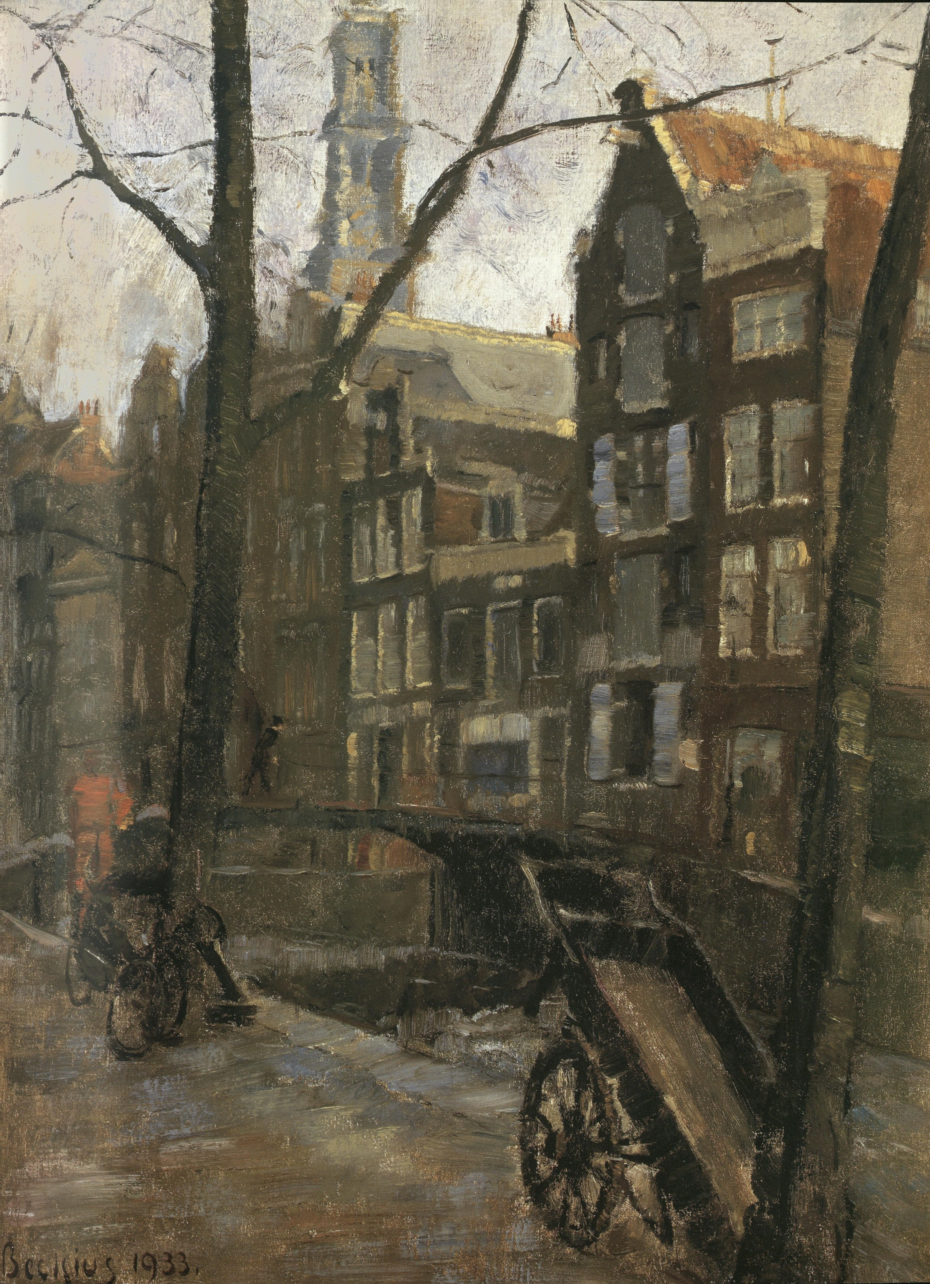 1933. Huile. 71 x 51 cm. Signé et daté en bas à gauche. Collection Musée national d'histoire et d'art, Luxembourg. (ouvrage numérisé).